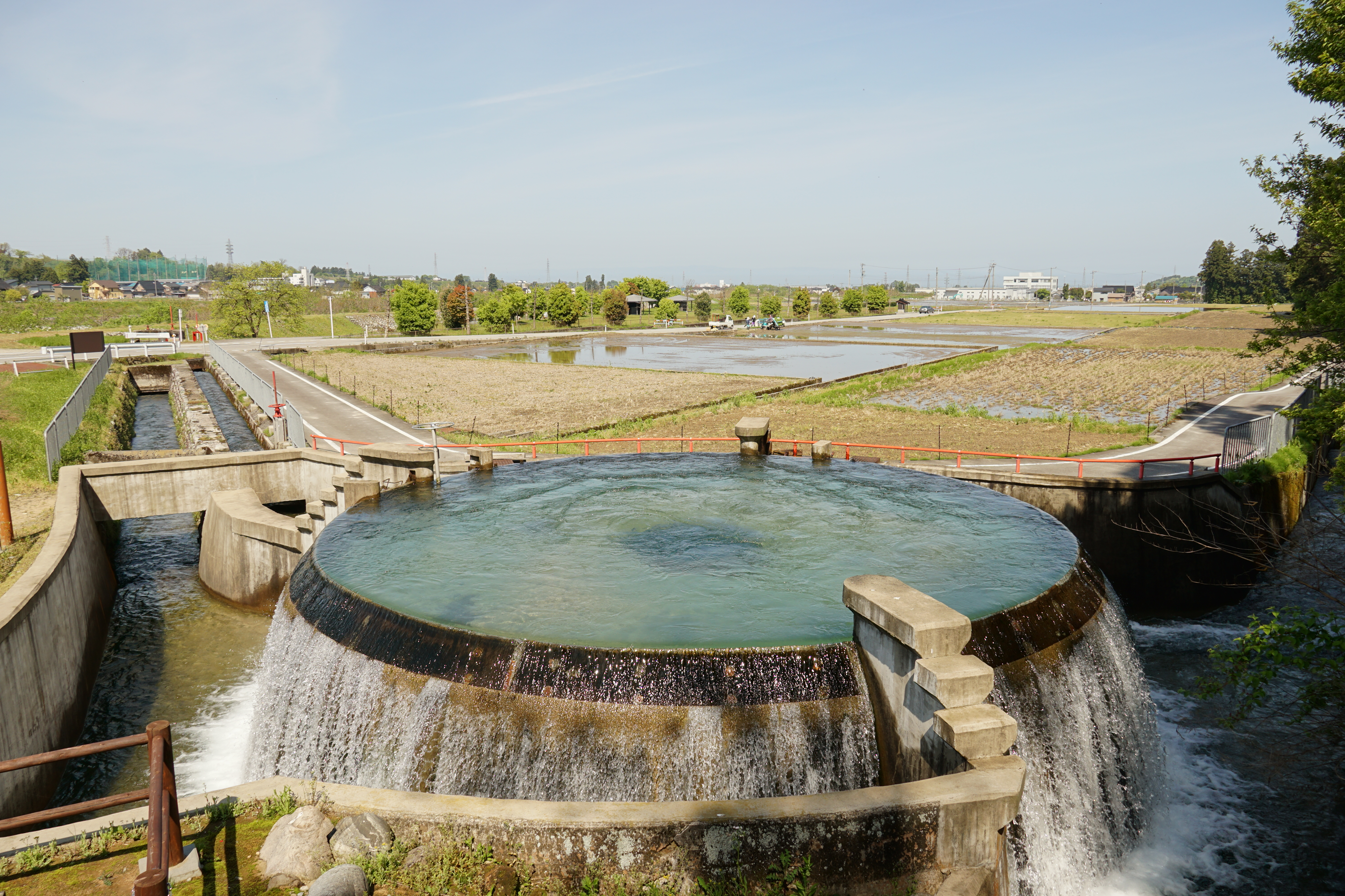 東山円筒分水槽を水門開閉施設の上から撮影。水田に水が引かれ田植えの準備が始まっている。